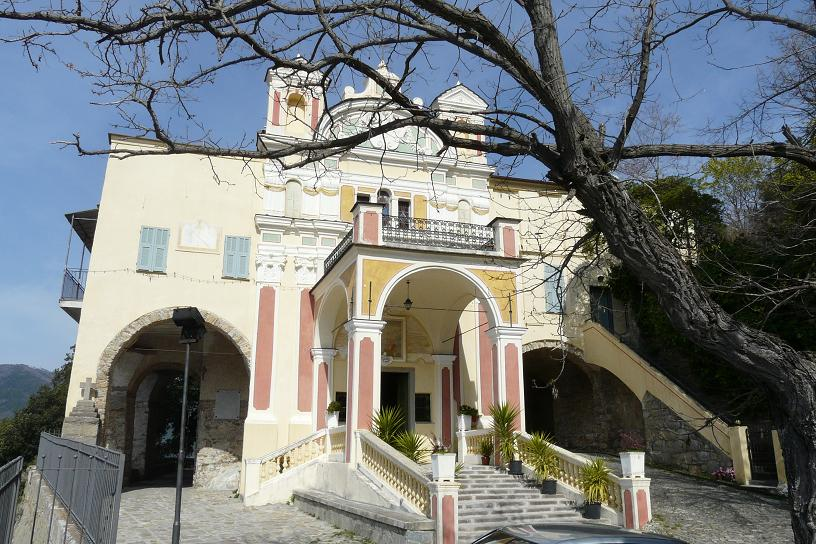 Foto varie del Santuario di Nostra Signora di Lampedusa, Castellaro, Liguria, Italia